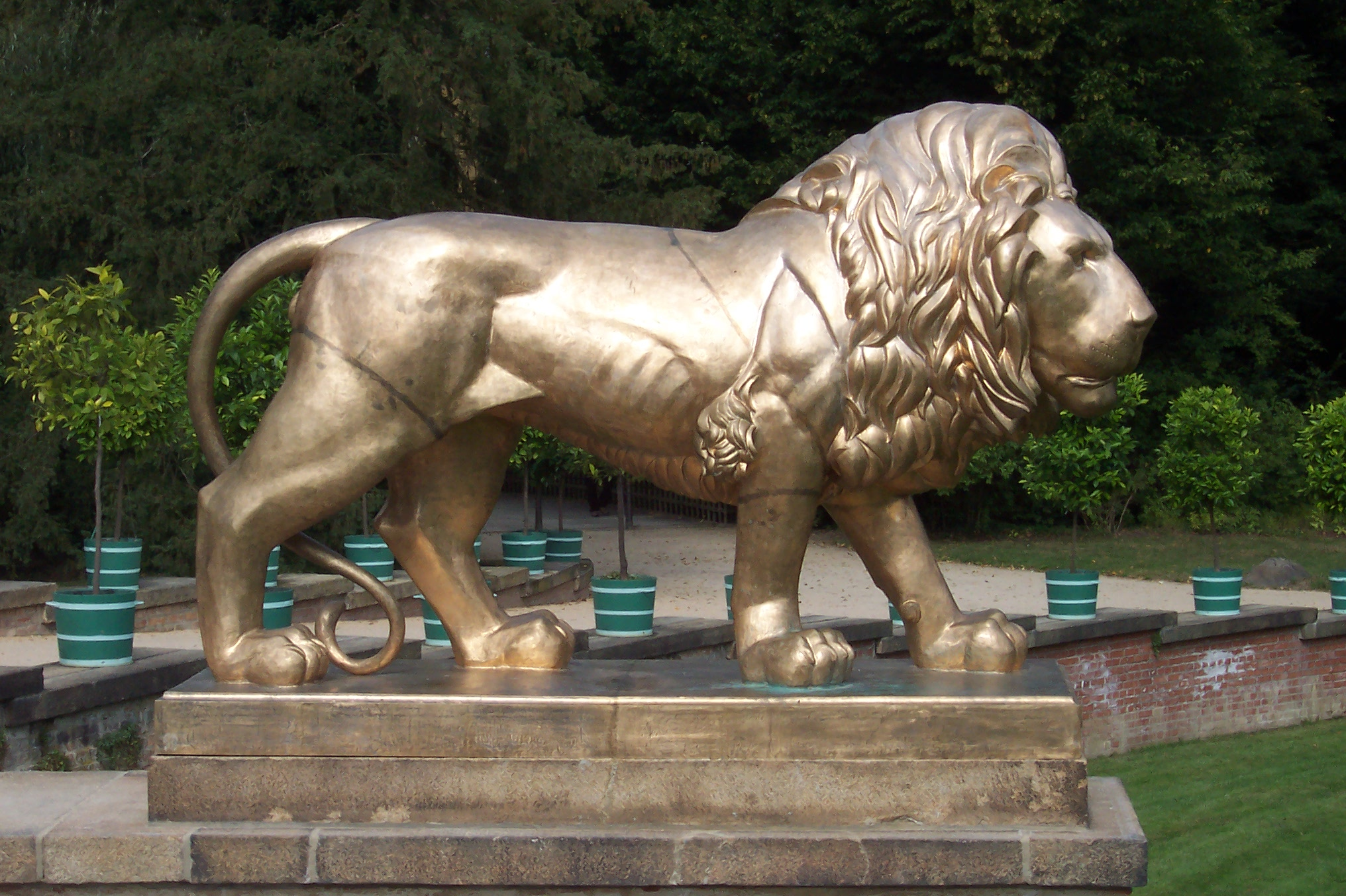 Löwe auf der nördlichen Treppenwange der Schlossrampe des Neuen Schlosses (Wappentier des Prinzen Friedrich der Niederlande)